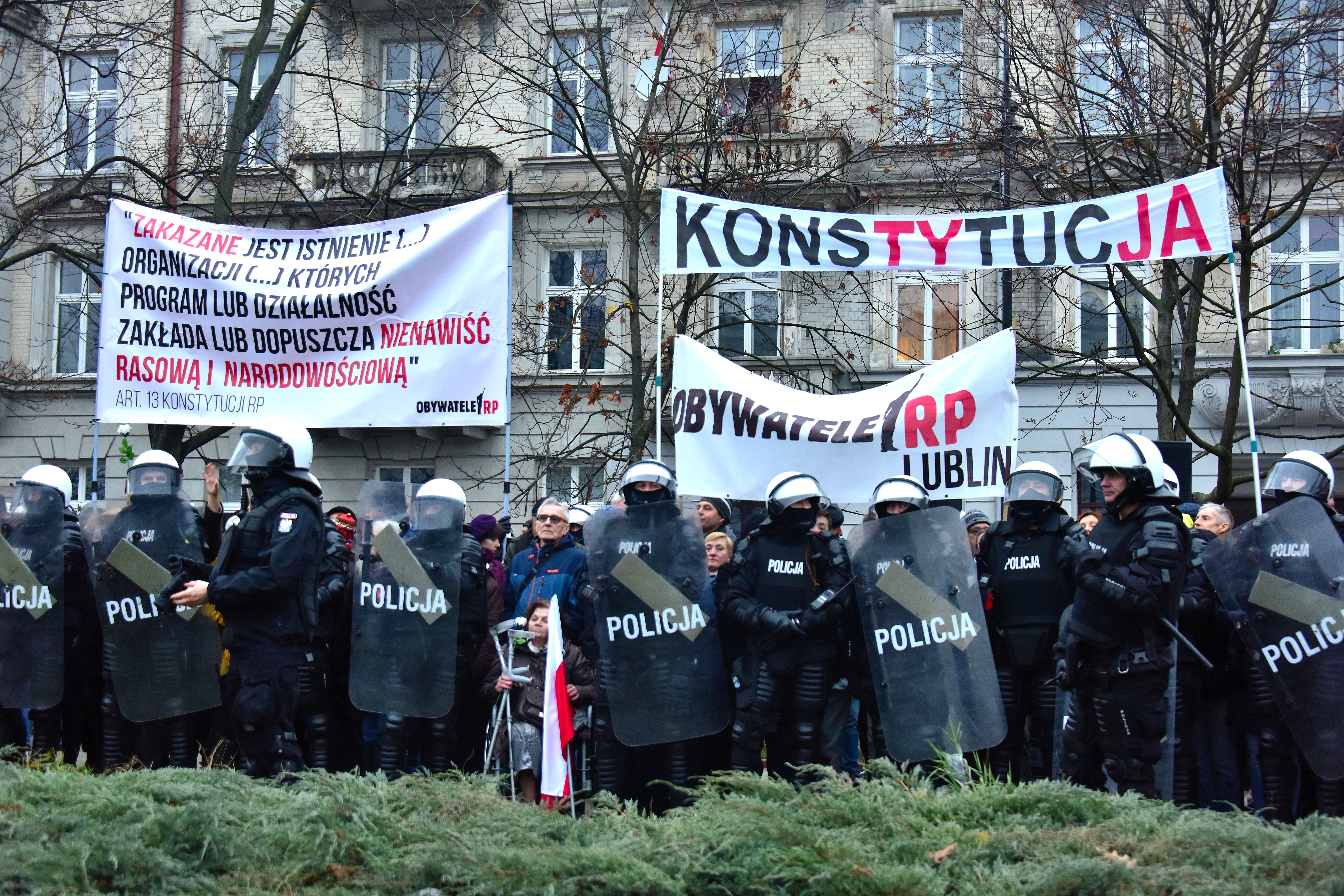 Pikieta Obywateli RP na skwerze podczas Marsz Niepodległości w Warszawie